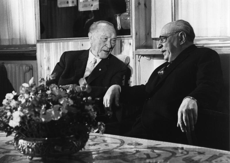 Dr. Adenauer (l.) im Gespräch mit dem isralischen Staatspräsidenten Schasar (r.) in Jerusalem.